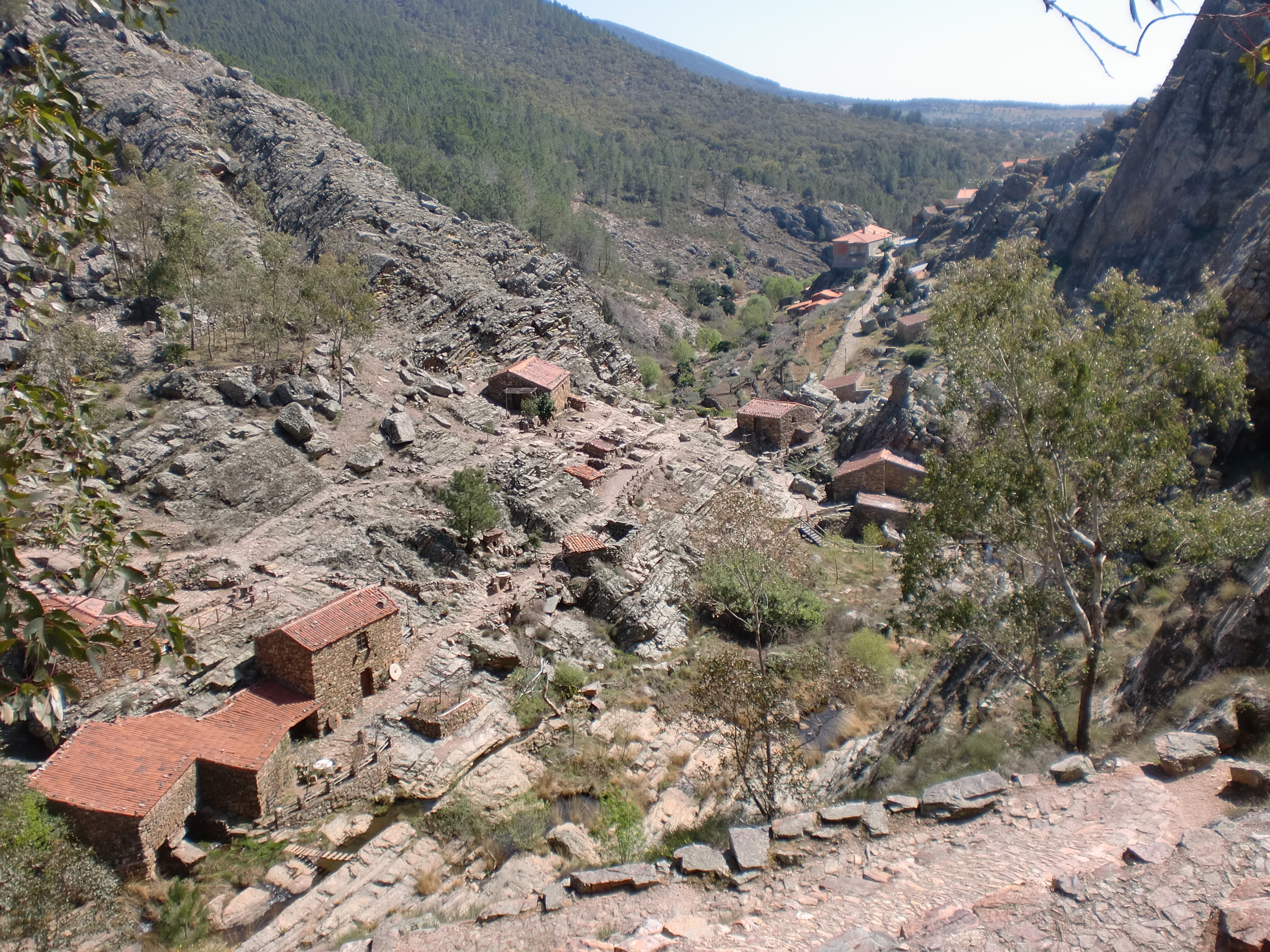 Vale do Rio Ponsûl.